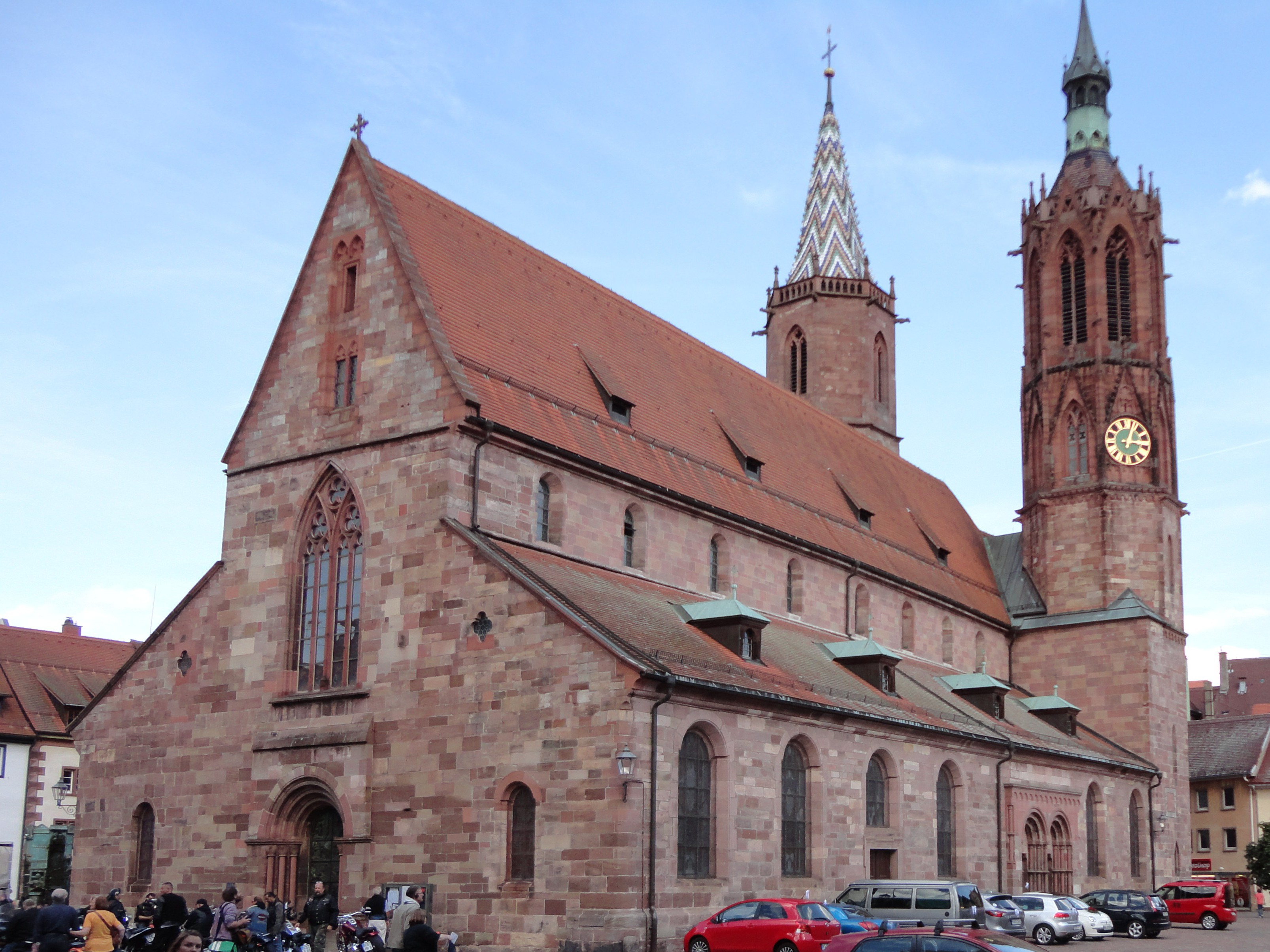 Münster in Villingen (Schwarzwald), Westseite.